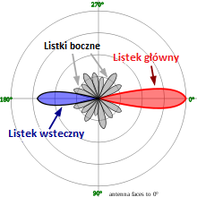 Antenna pattern